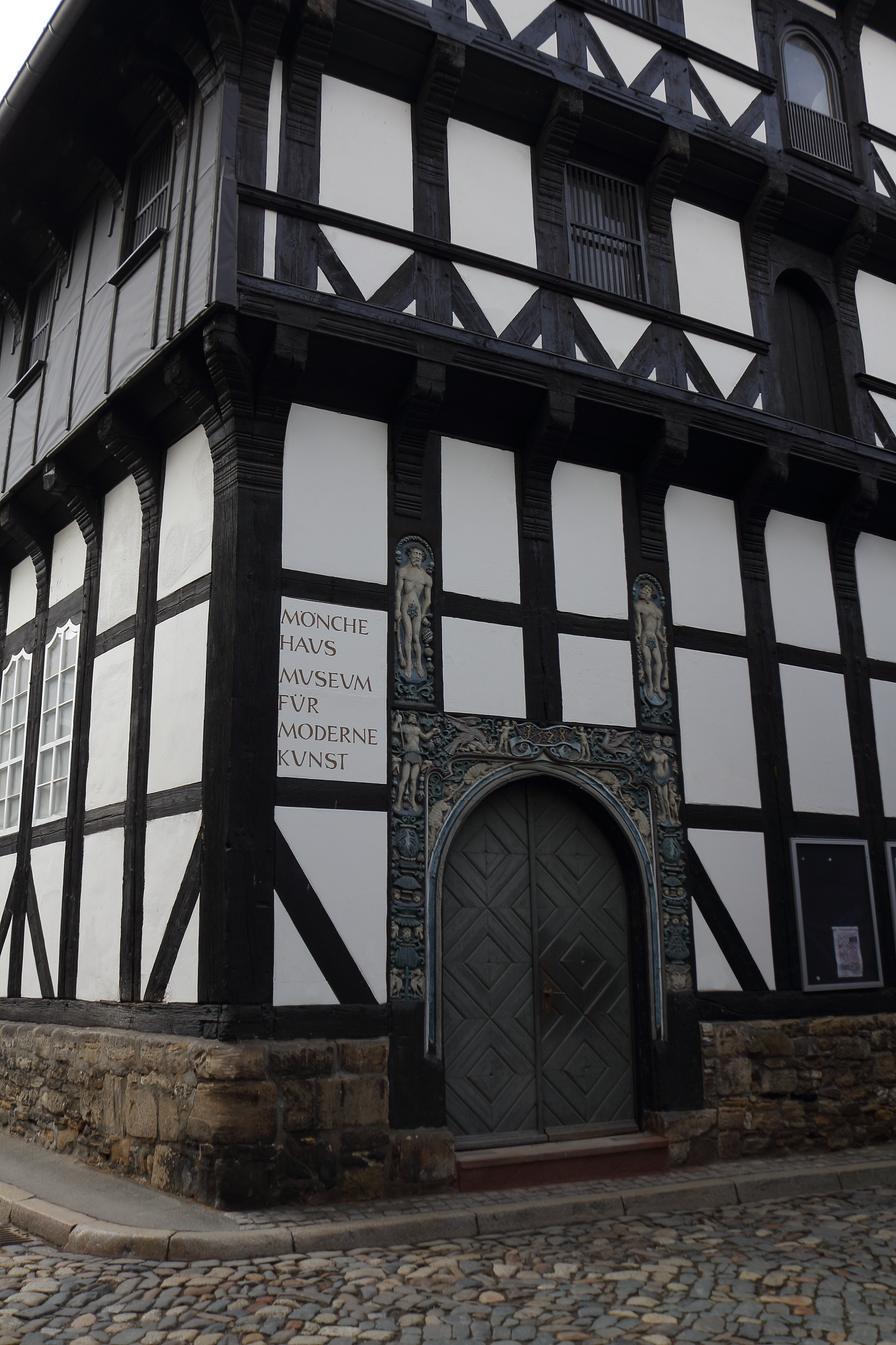 Goslar